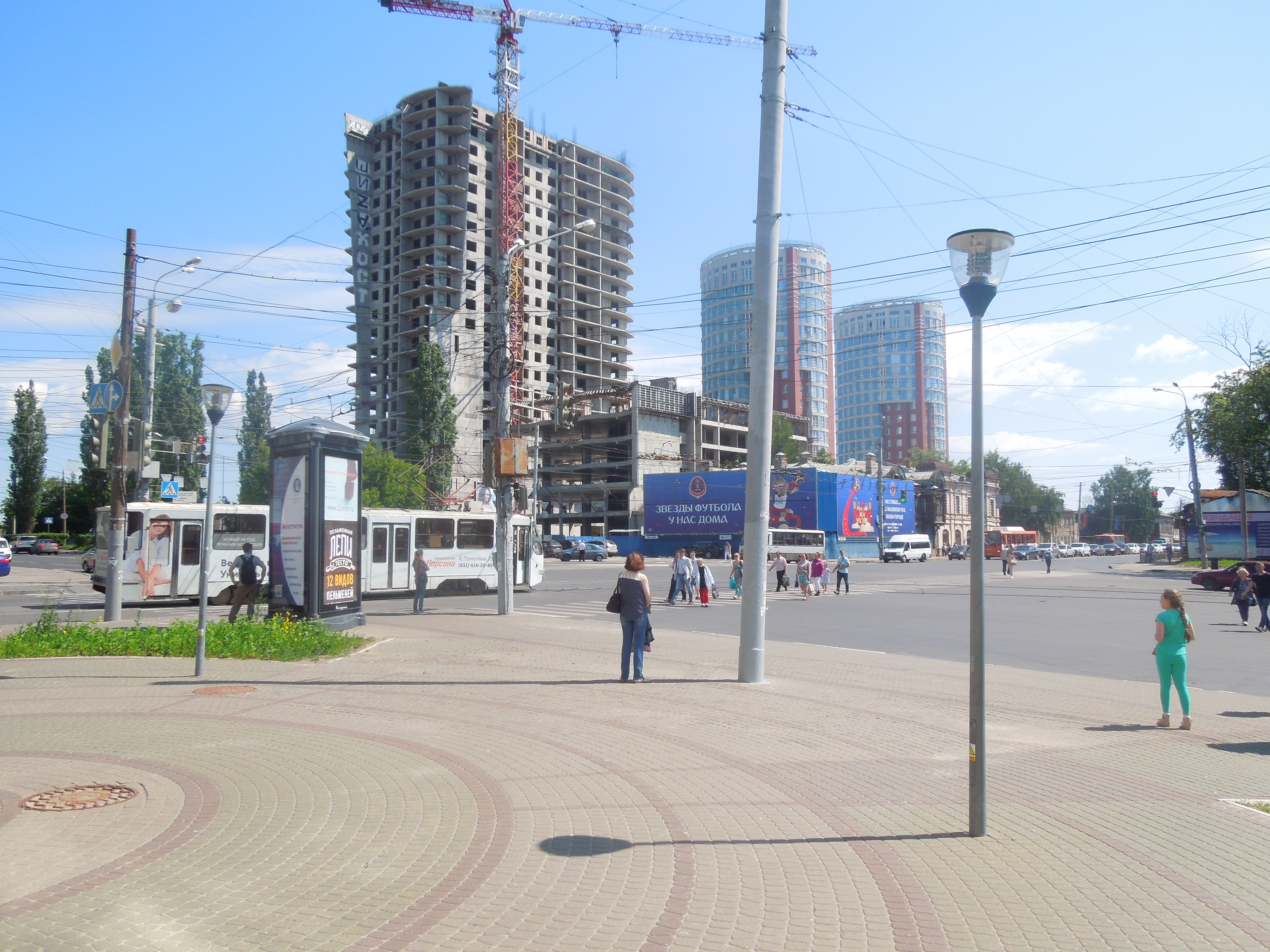 Площадь